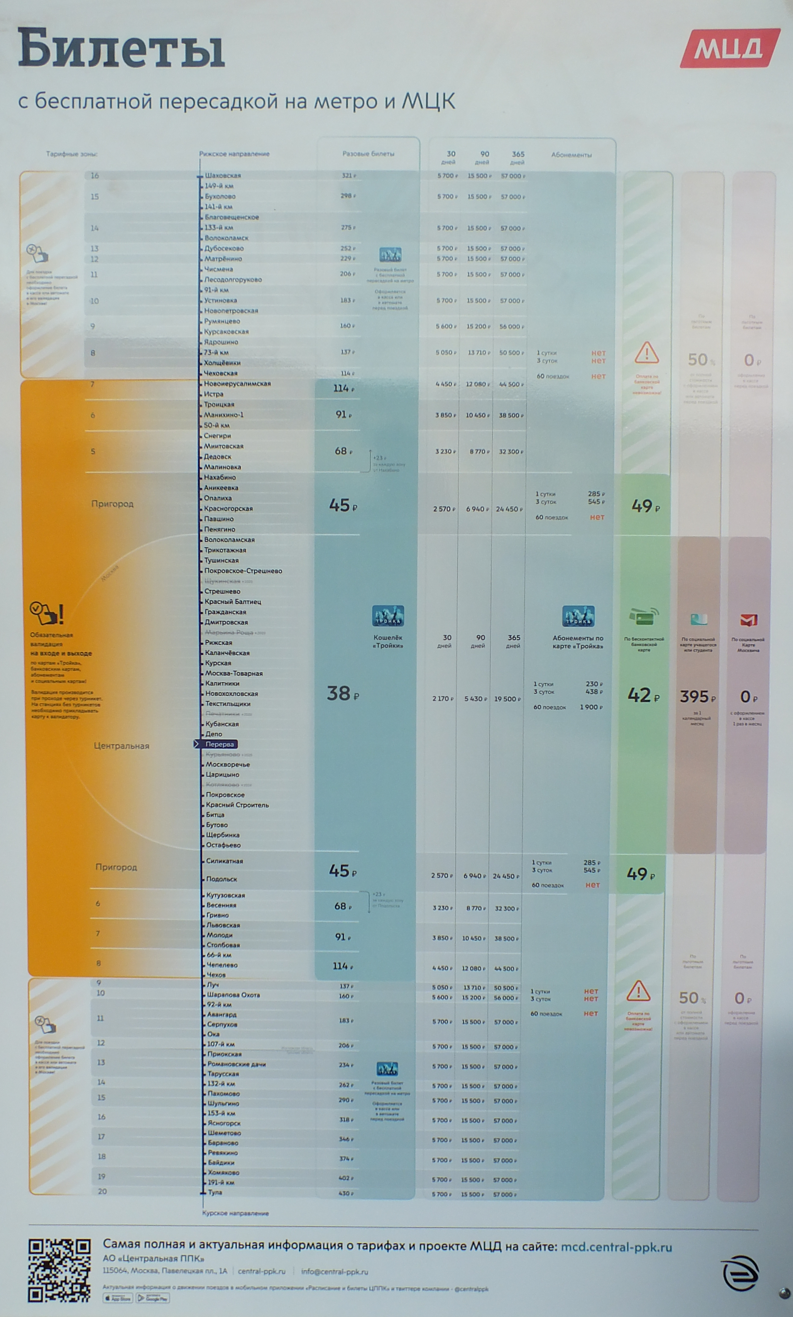 Информация о стоимости билетов на линии МЦД-2 Московских центральных диаметров на платформе Перерва 23 ноября 2019